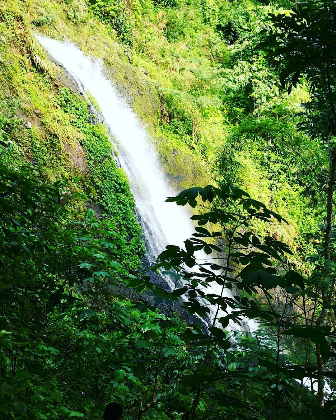 Curug Saliala